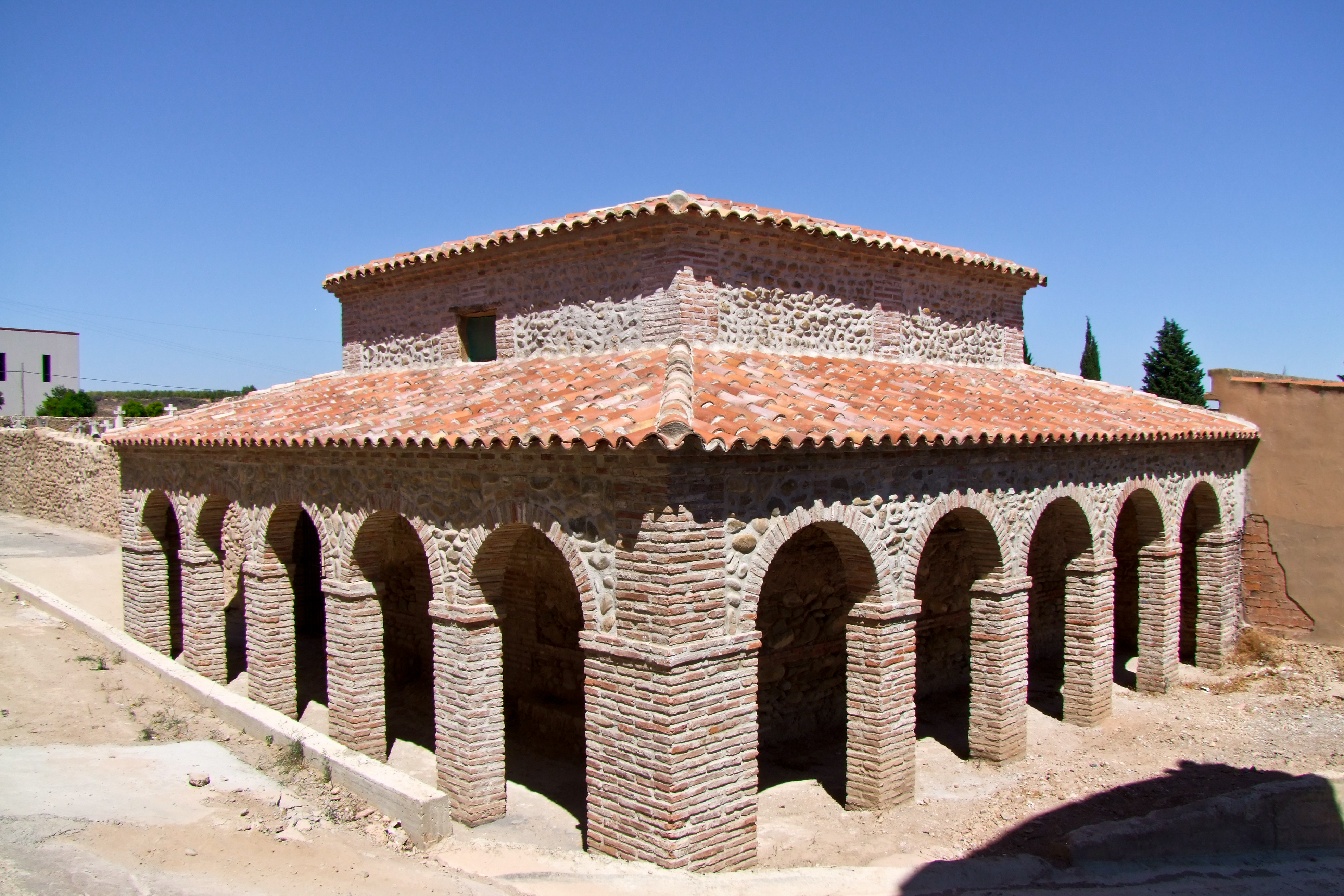 Ermita del Ángel en la localidad de Autol, La Rioja - España